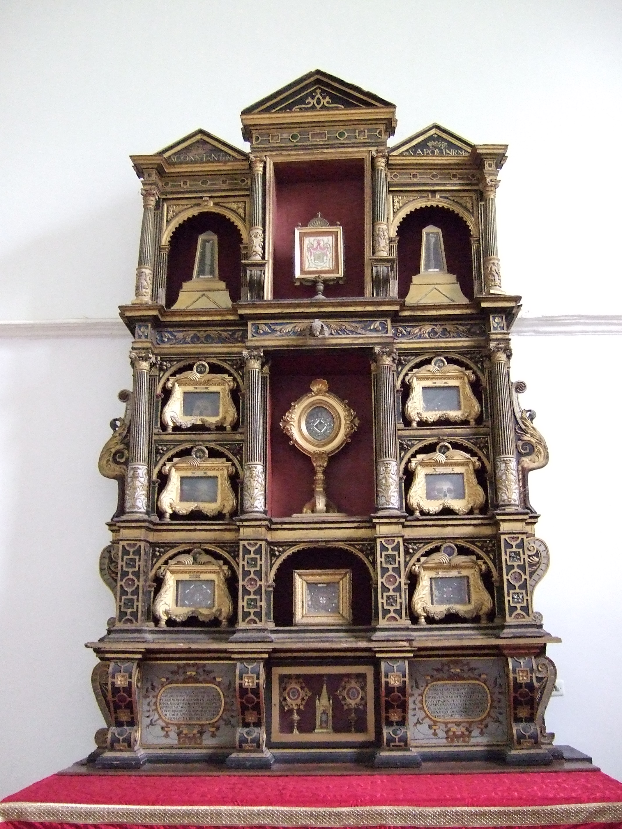 Armario con relicarios en la Cartuja de Miraflores (Burgos)